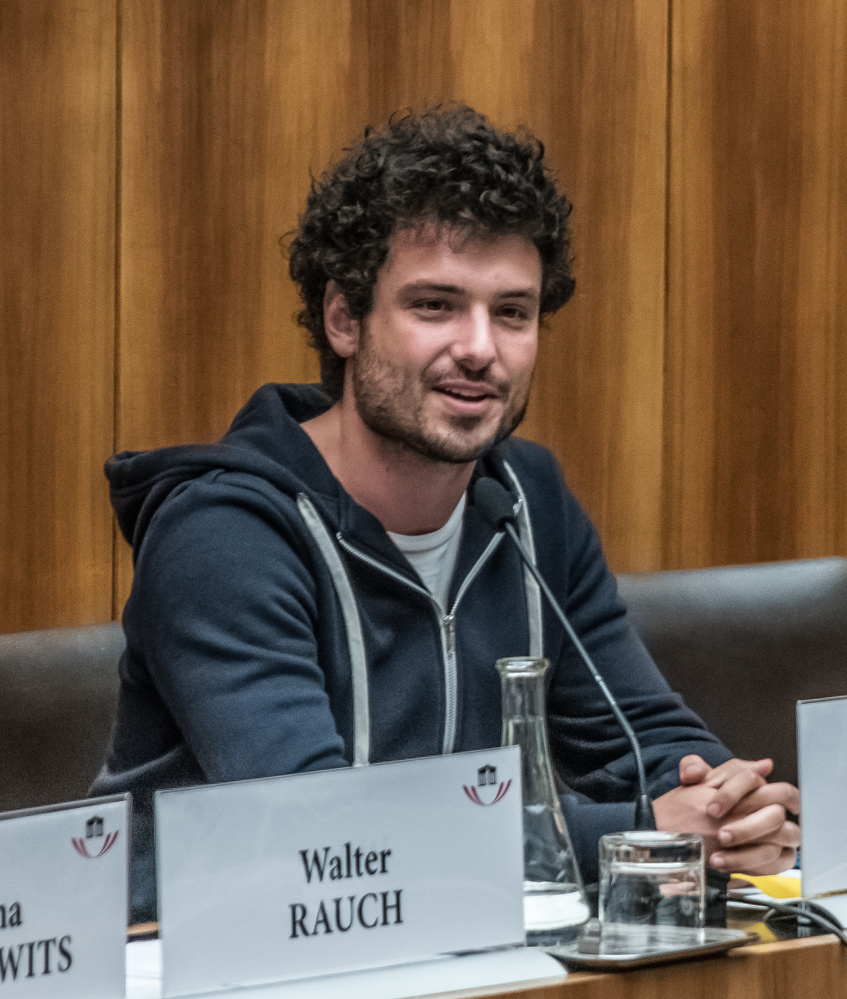 Julian Schmid, Nationalratsabgeordneter der Grünen, beim Jugendparlament am 10. Juni 2016 im österreichischen Parlament